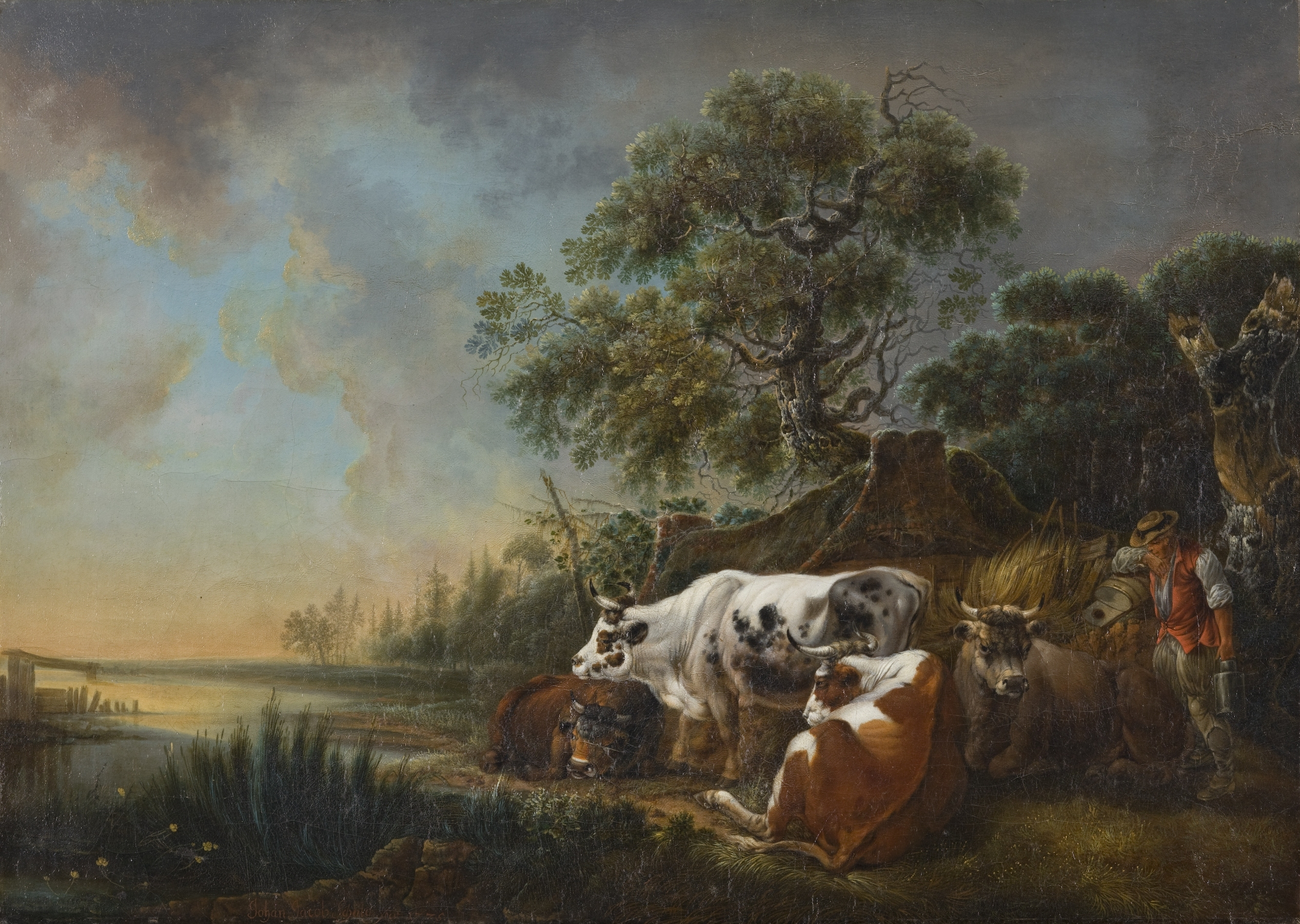 "Bauer mit weidenden Kühen am Fluss", gemalt von Johann Jakob Schalch. Signiert und datiert (1775) unten links. Öl auf Leinwand (39 x 54cm). Privatsammlung Schweiz